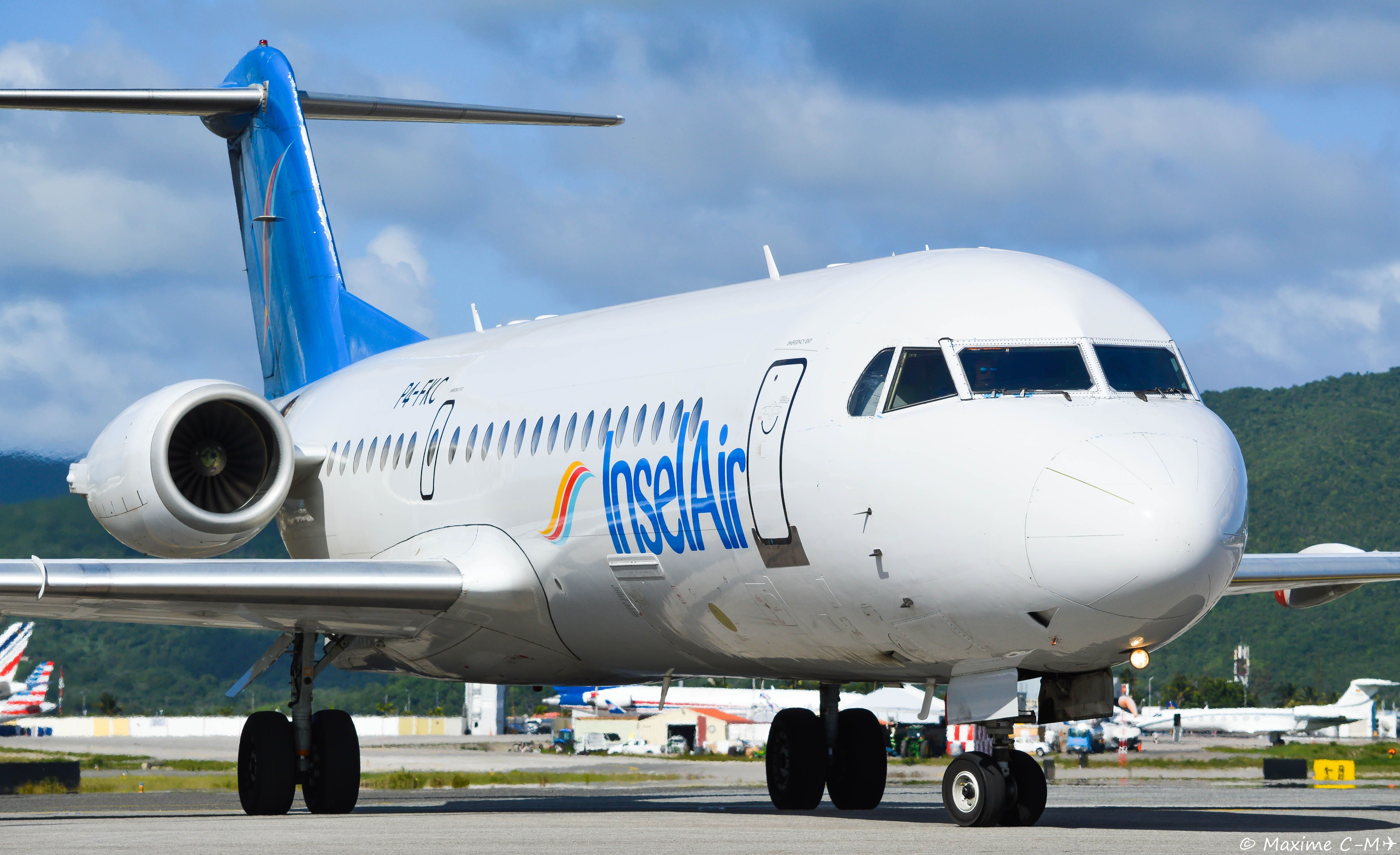 P4-FKC 🇦🇼 InselAir Aruba 🇦🇼 Fokker F70 🇳🇱 TNCM / SXM 🇸🇽